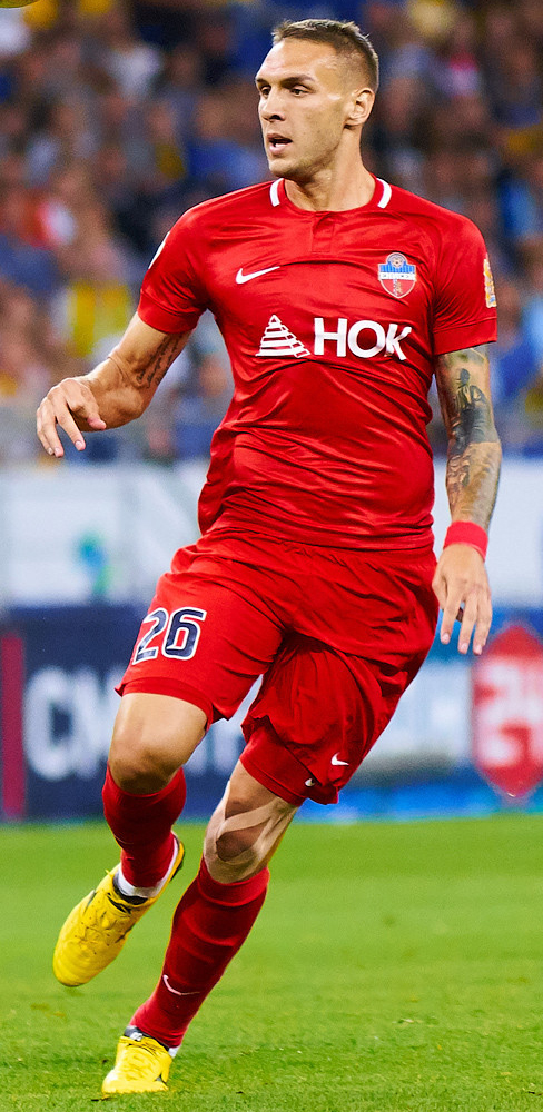 Разгром по-ростовски. Карпин против Аленичева